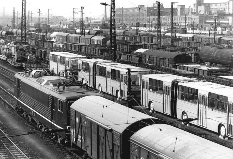 Dresden, Güterbahnhof ADN-ZB Häßler 31.3.1981 Dresden: Ein neues Ablaufspeicherwerk wurde in Dresden-Friedrichstadt seiner Bestimmung übergeben. Auf dem größten Güterbahnhof der DDR werden täglich etwa 4400 Waggons zu Zügen zusammengestellt.